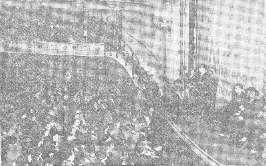 Acto organizado por la Agrupación Escolar Tradicionalista